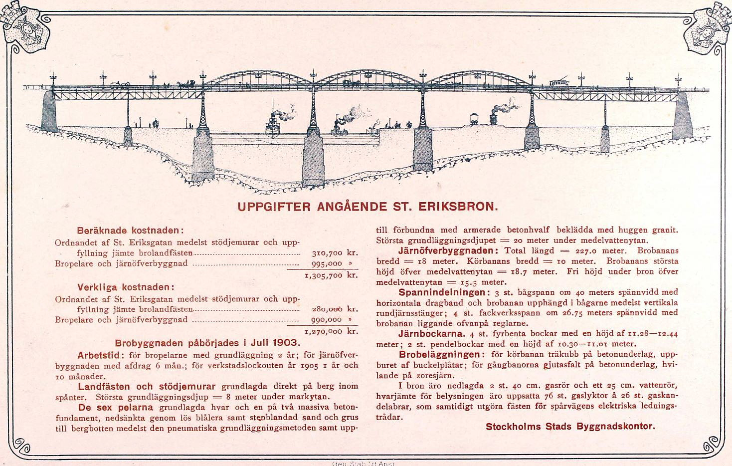 Kort som berättar om invigningen av S:t Eriksbron den 15 december 1906, med fakta om bron och dess byggnadshistoria.